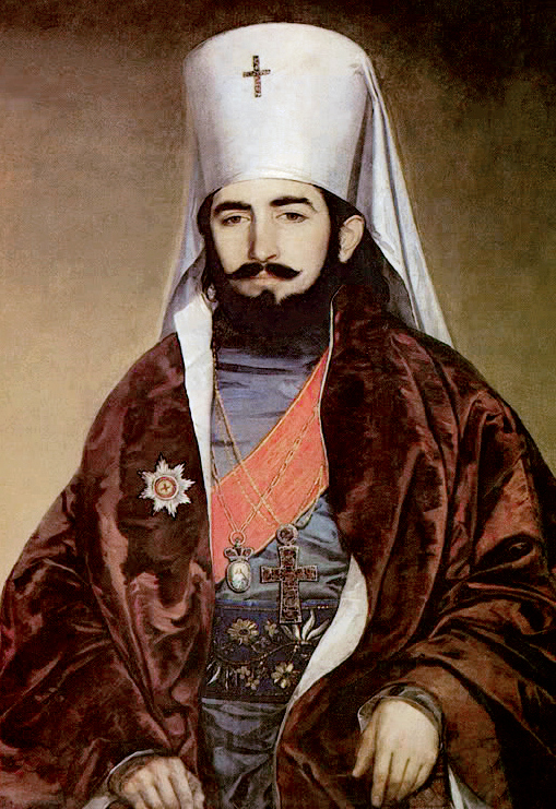 Petar II Petrović Njegoš (1813-1851)